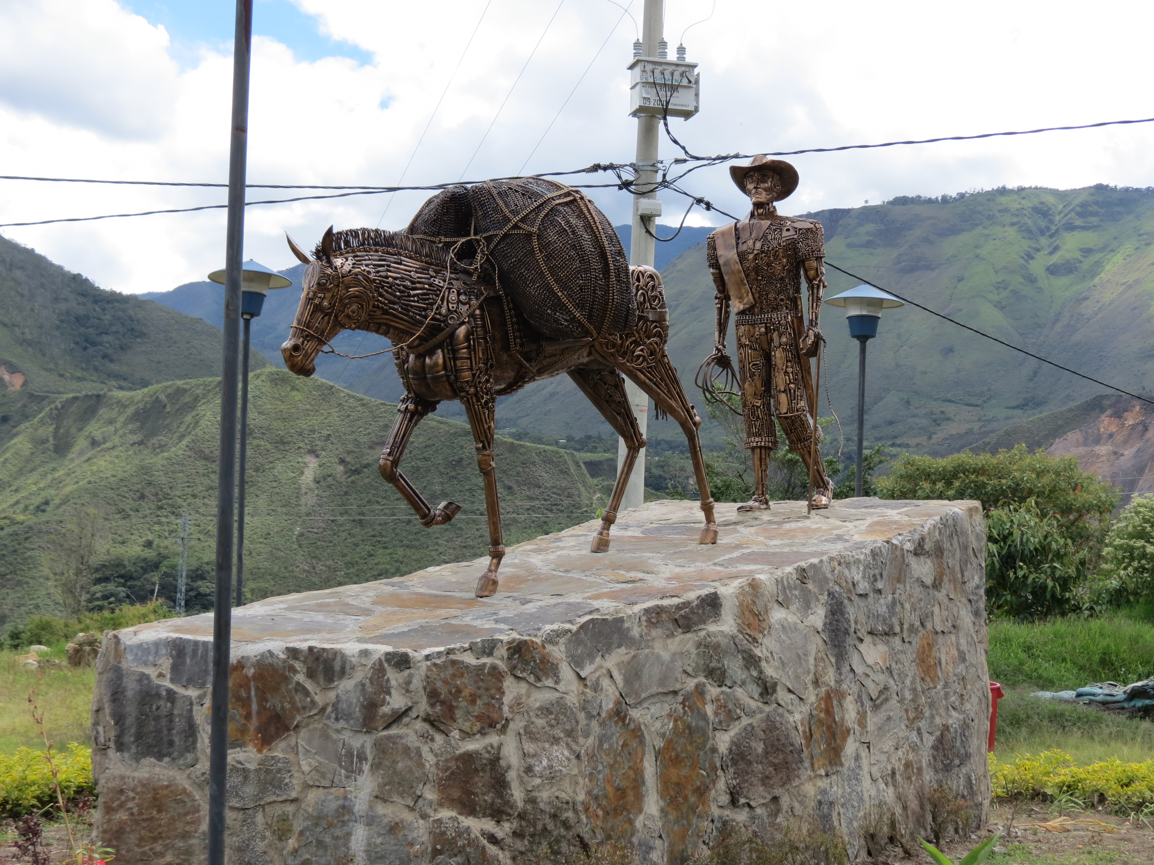 Escultura en metalmecánica de un cafetero en plena labor, en el munciipio de Pisba, paso histórico de los liebratdores de Colombia